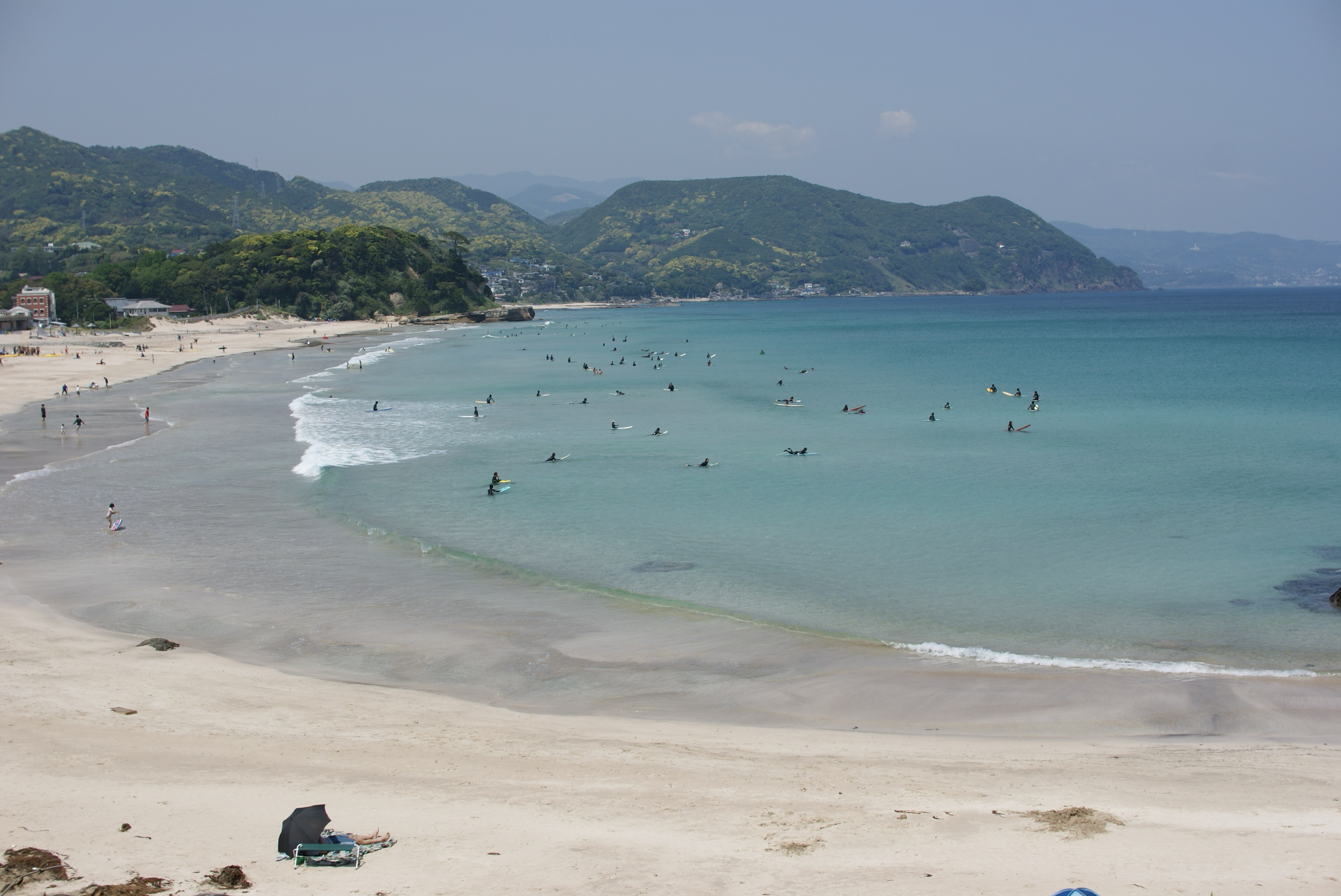 白浜大浜海水浴場。静岡県下田市。 Sony DSLR-A200